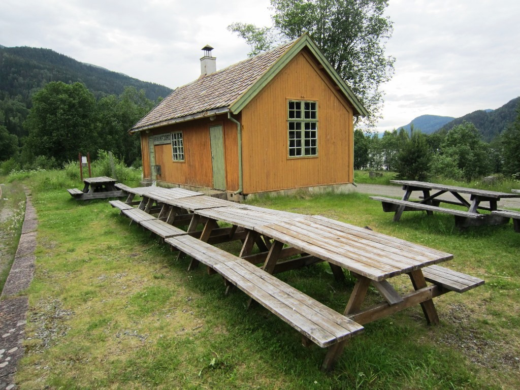 Kravikfjor stasjon på Numedalsbanen